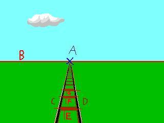 Příklad:Koleje C a D se setkávají v bodě A (úběženík), B je horizont. Pražce G a F vypadají k sobě blíže než F a E